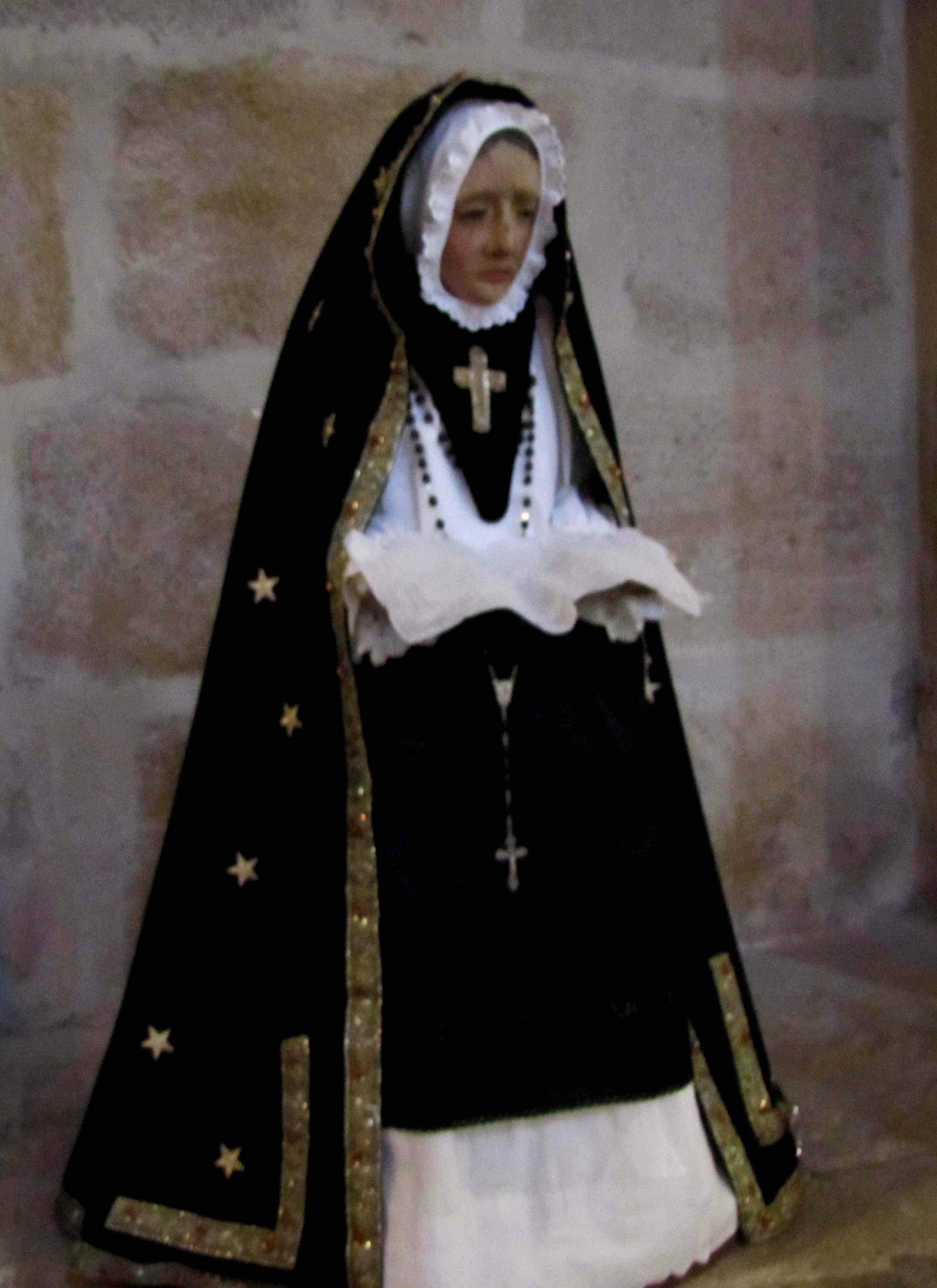 Virgen de la Soledad. Serón de Nágima